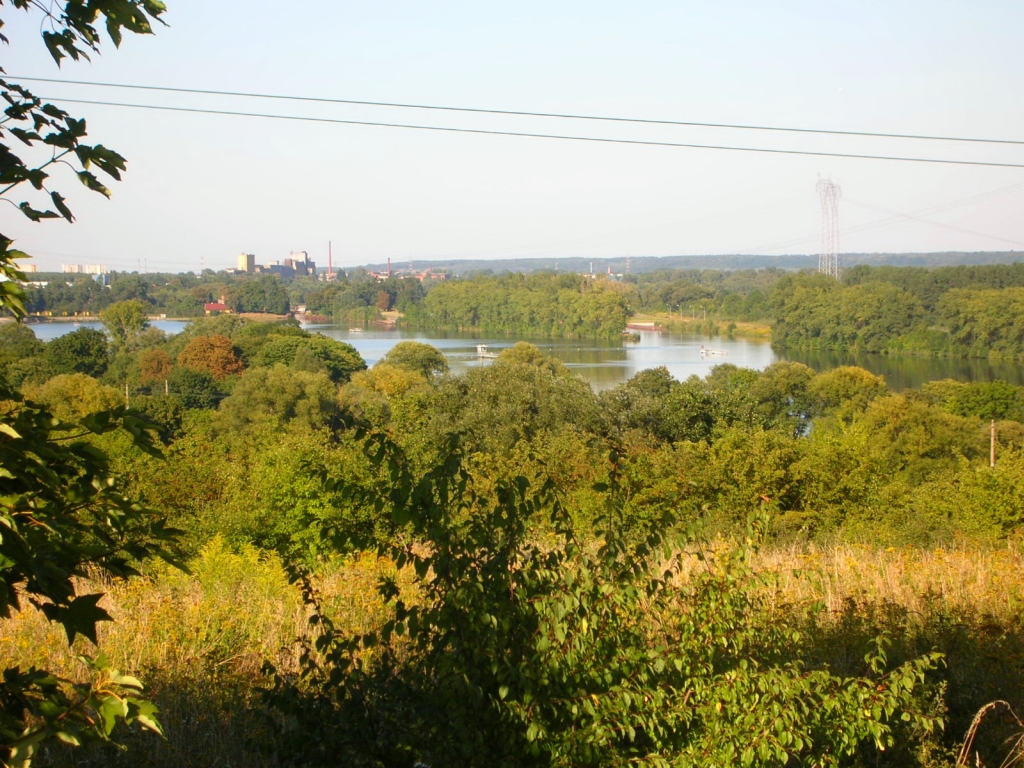 Widok ze Wzgórza Bolesława Krzywoustego w Czersku Polskim na tor regatowy w Bydgoszczy